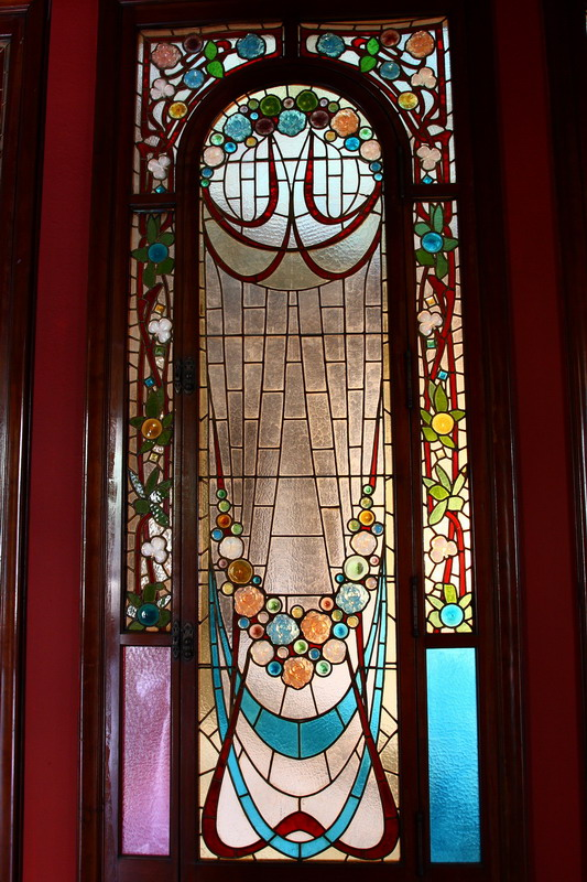 Casa Burés, obra modernista de Francesc Berenguer i Mestres Construïda entre 1900-1905. Vitrall de l'escala del pis principal.